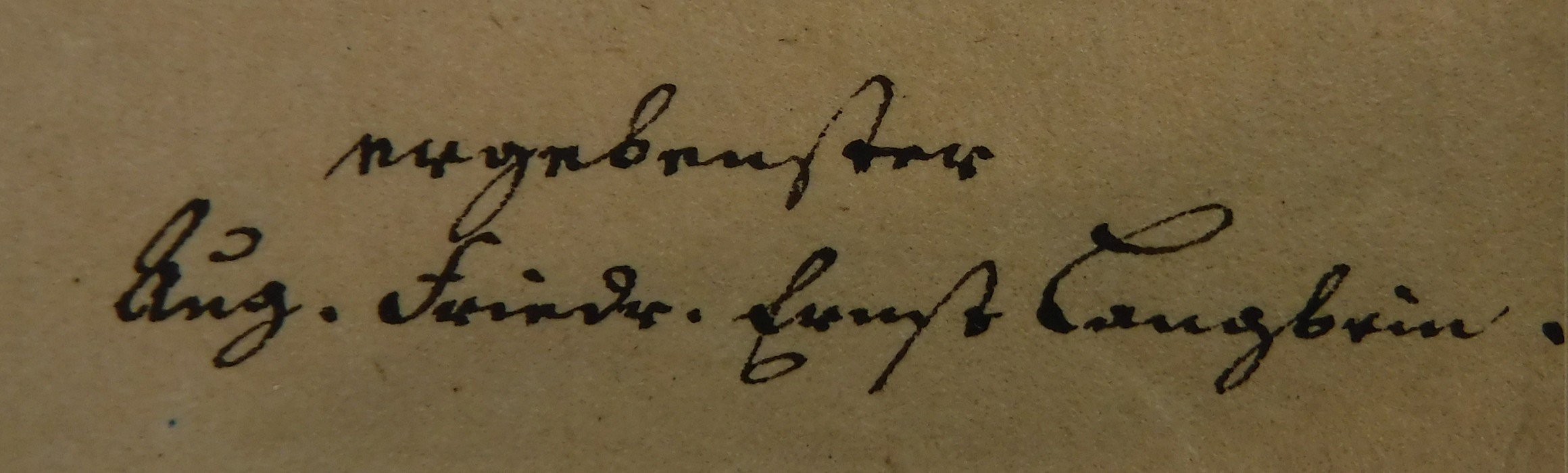 Unterschrift von August Friedrich Ernst Langbein unter einem Brief vom 30. Januar 1815 im Schloss Klippenstein